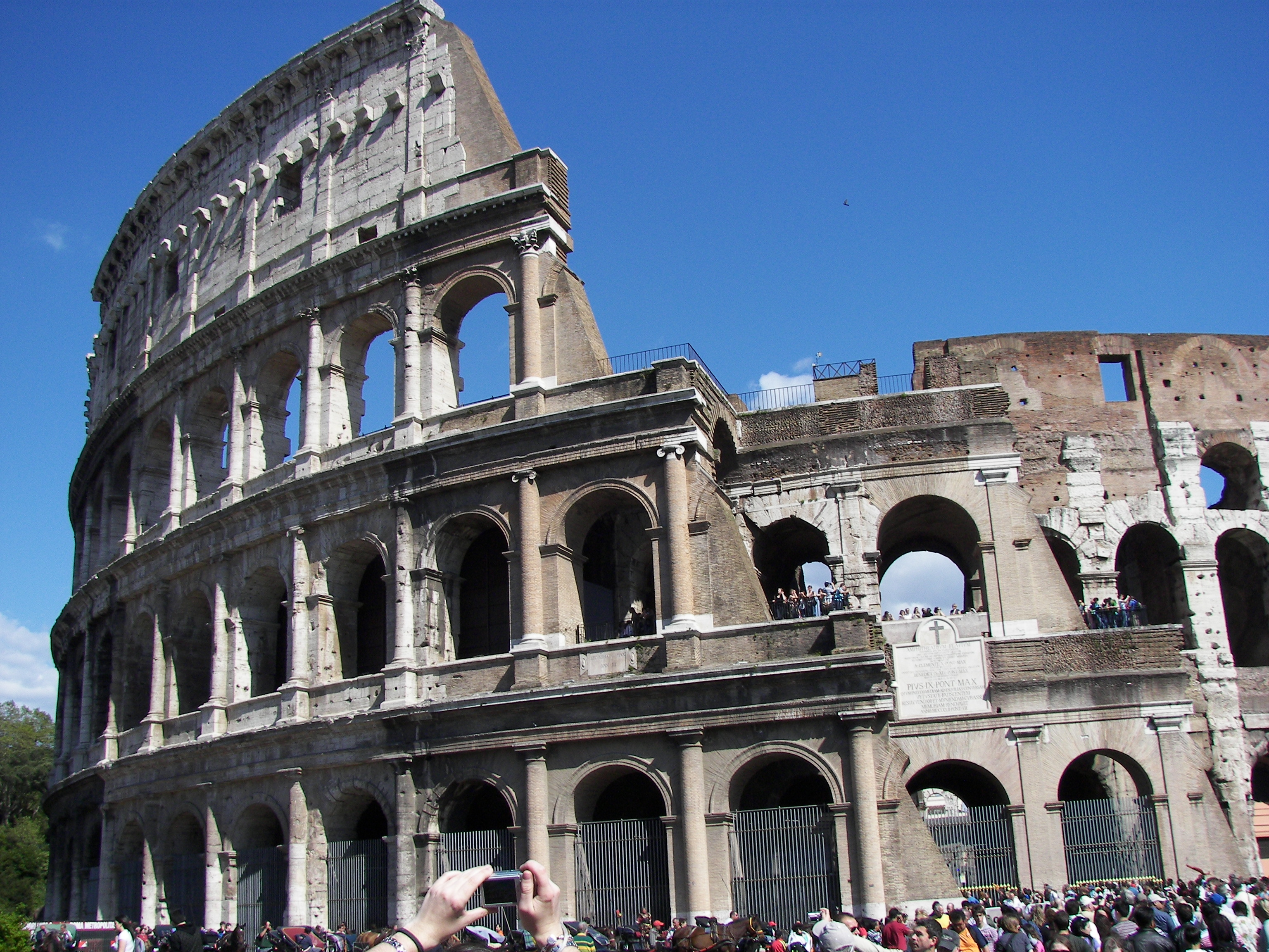 Colosseum in Rome.